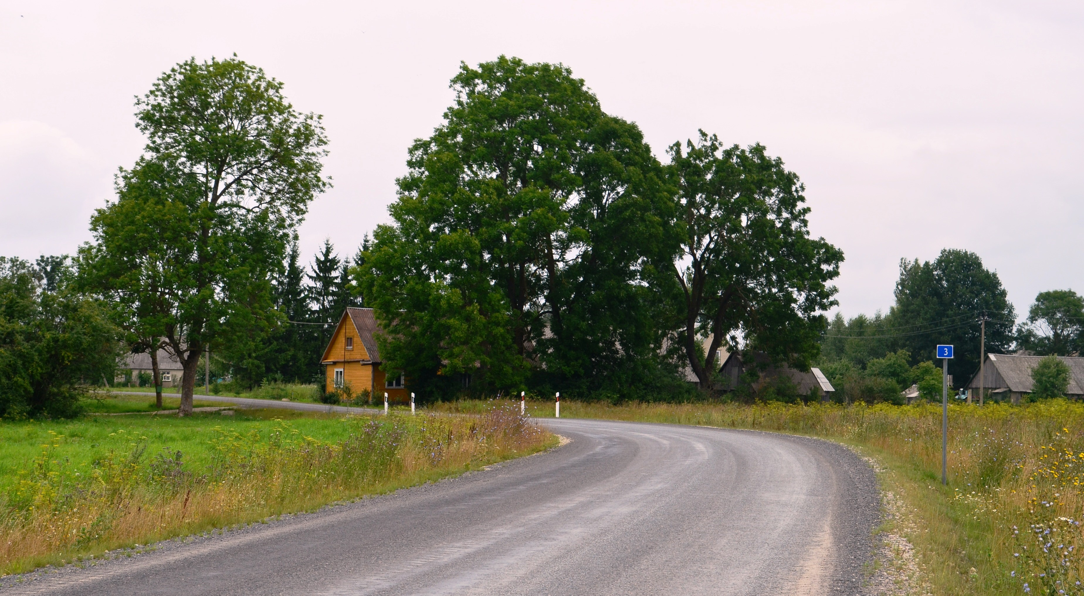 Minkūnai, Rokiškio r.